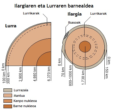 Lurra eta Ilargiaren arteko alderaketa barne osaerari dagokionean.